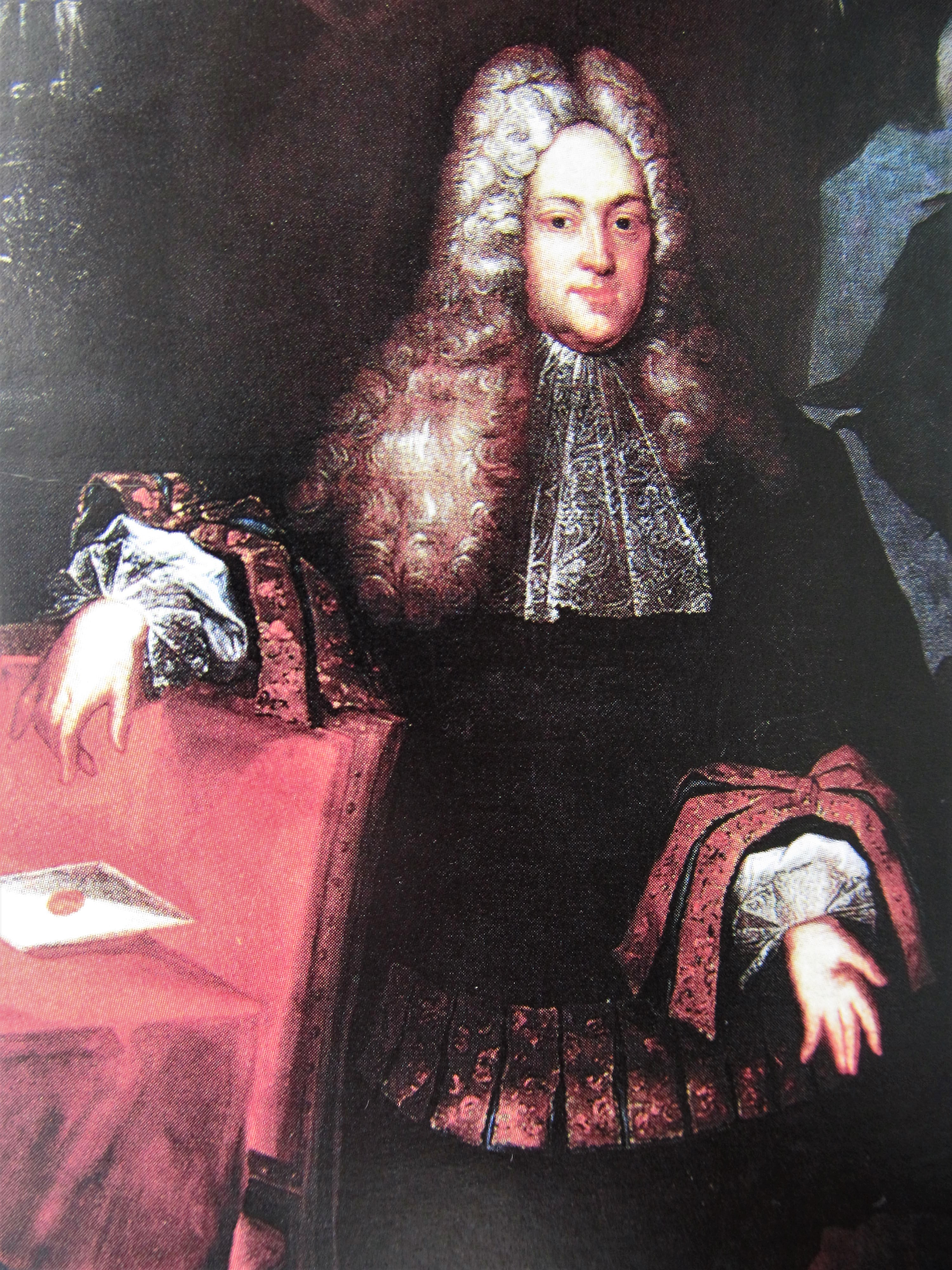 Hrabě Jan Josef z Valdštejna (1684-1731), nejvyšší maršálek Království Českého